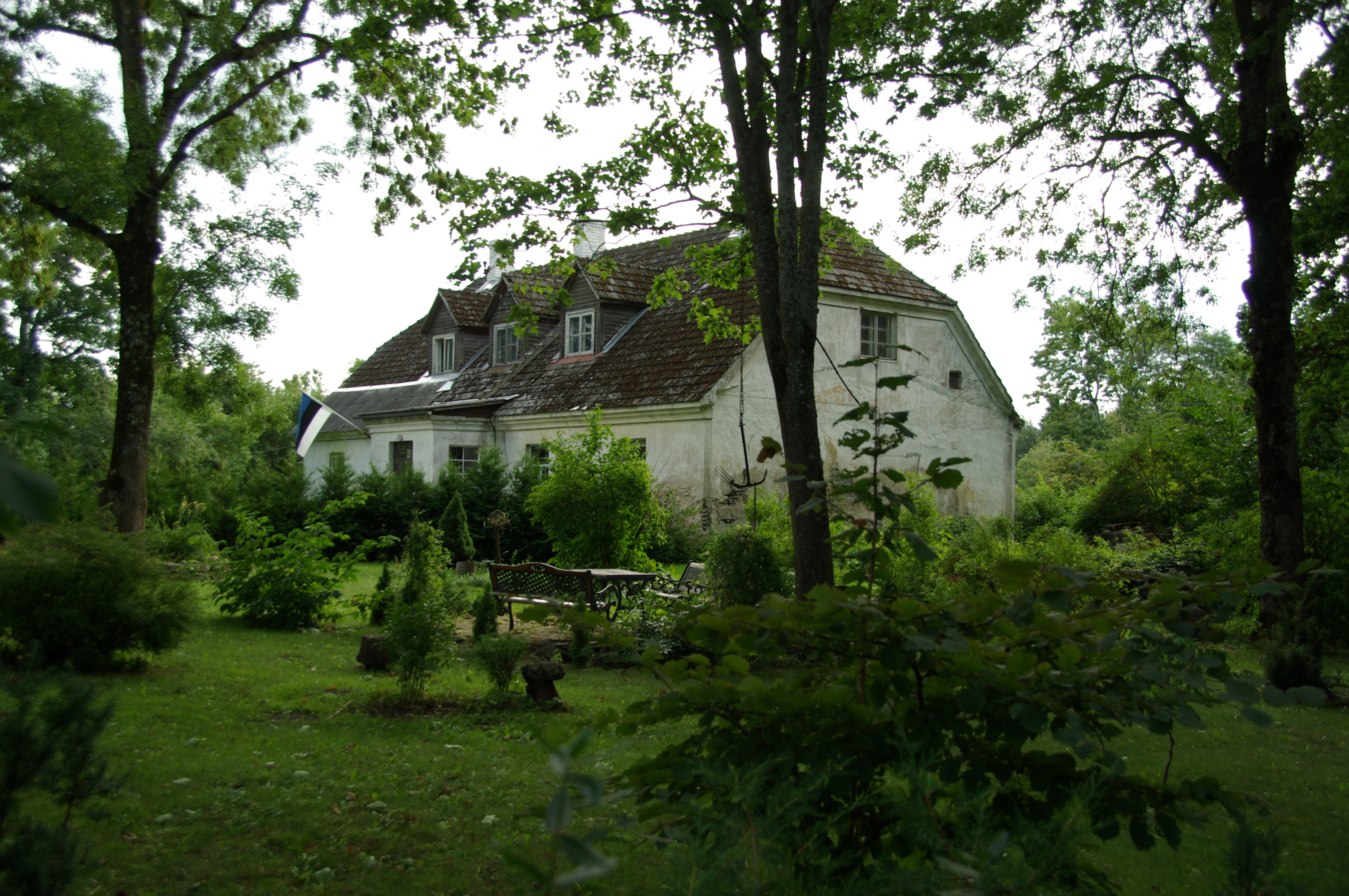 Mõigu mõisa ehk Peetri mõisa härrastemaja asub Järveküla territooriumil Rae vallas